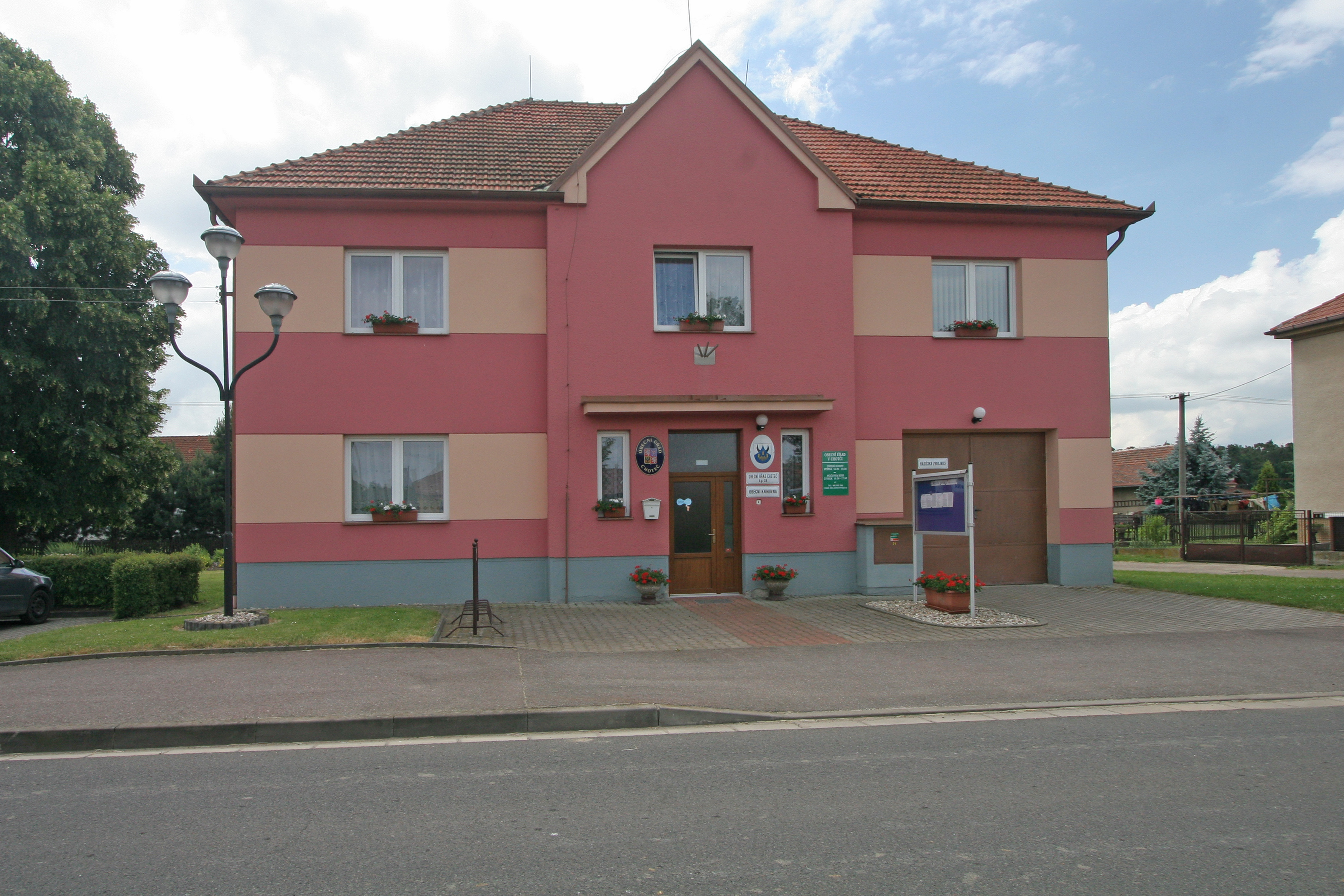 Choteč obecní úřad